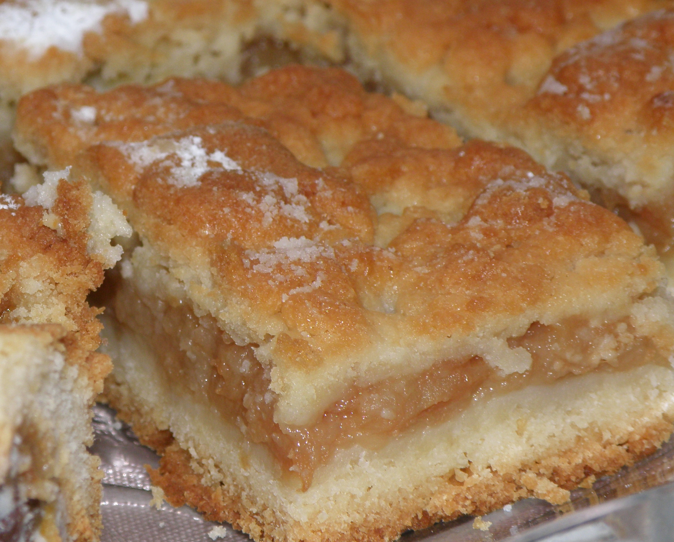 Szarlotka